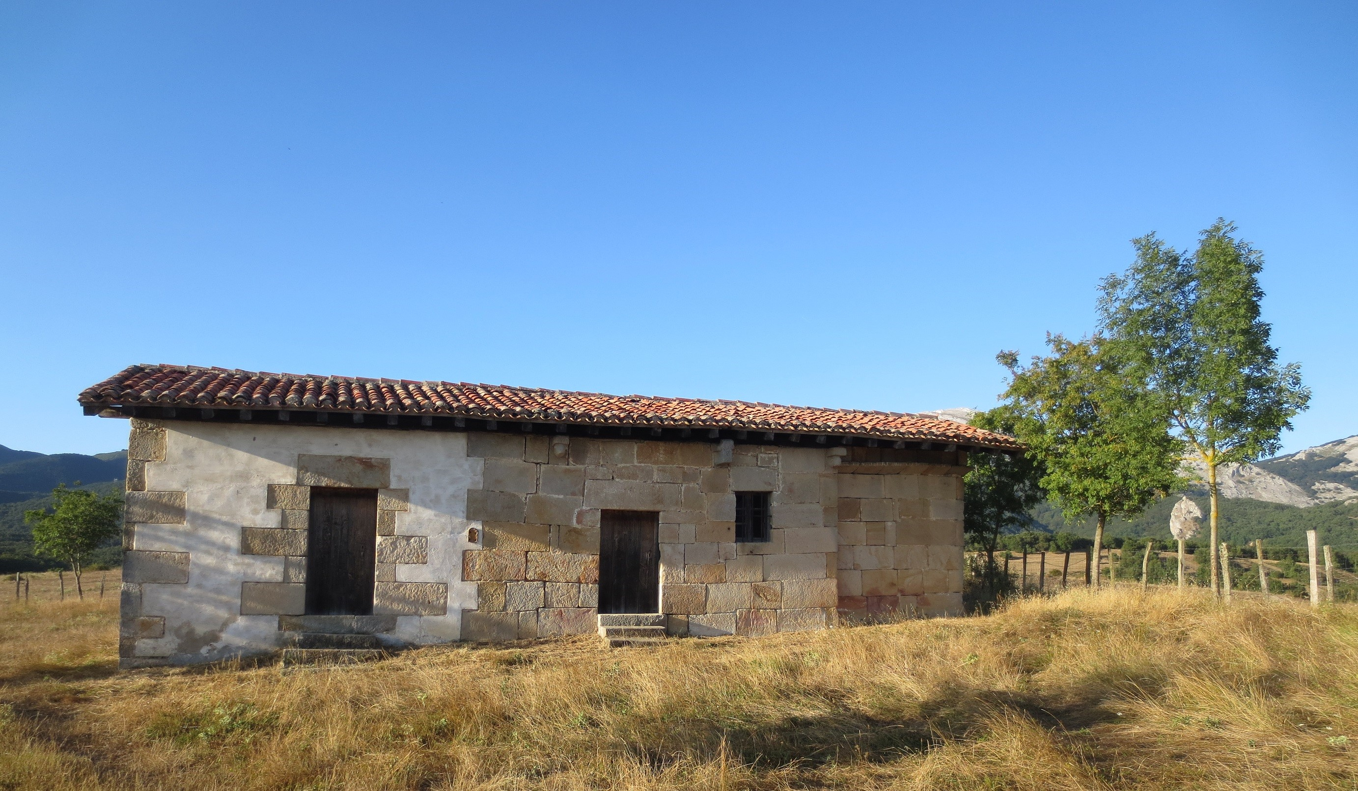 Donejakue bidea Araban